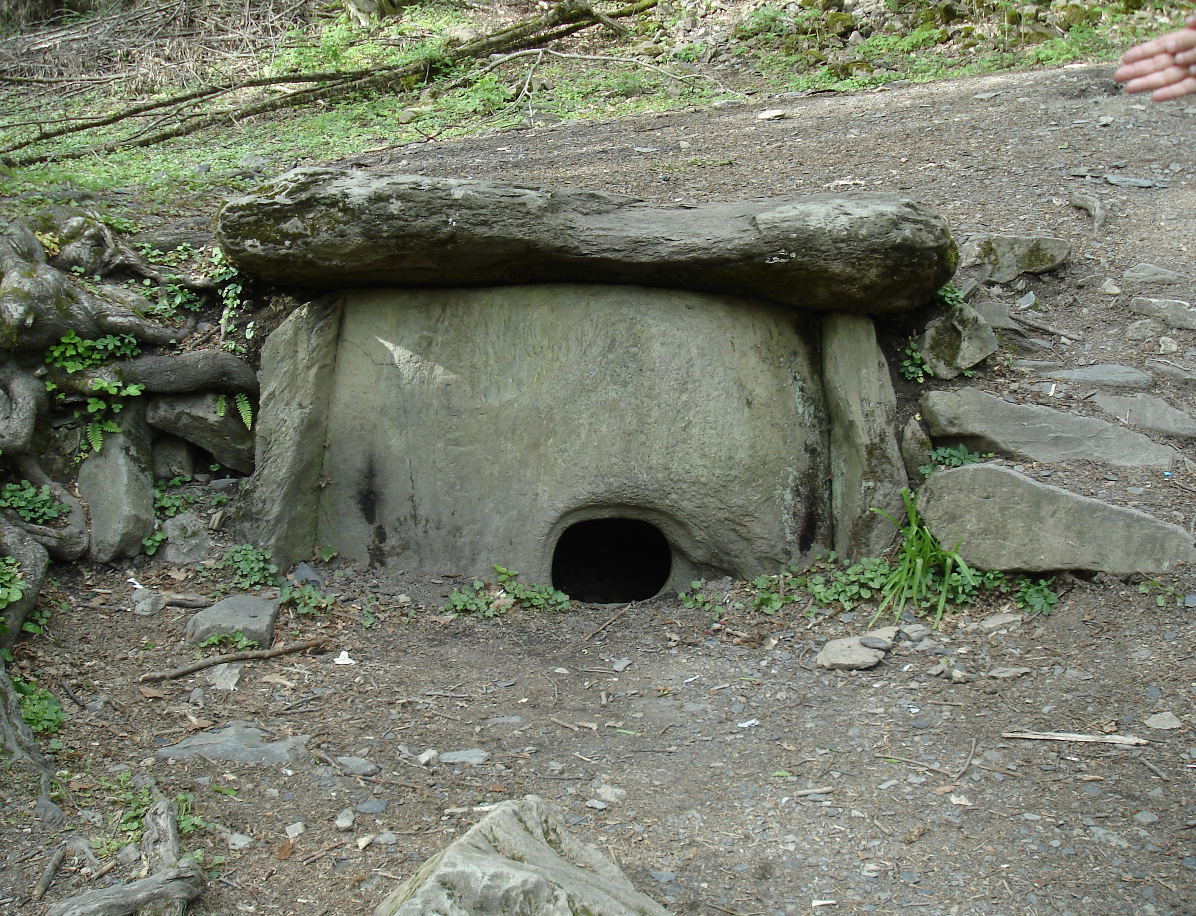 Дольмен в Красной Поляне.